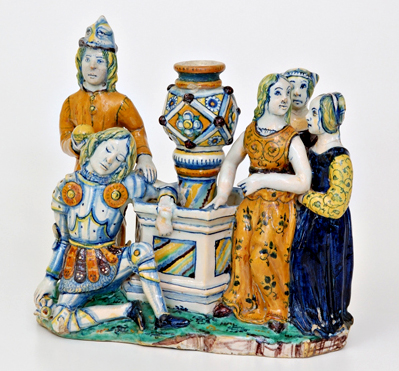 Calamaio a tutto tondo raffigurante il "Giudizio di Paride". Faenza, ultimo quarto del XV secolo.